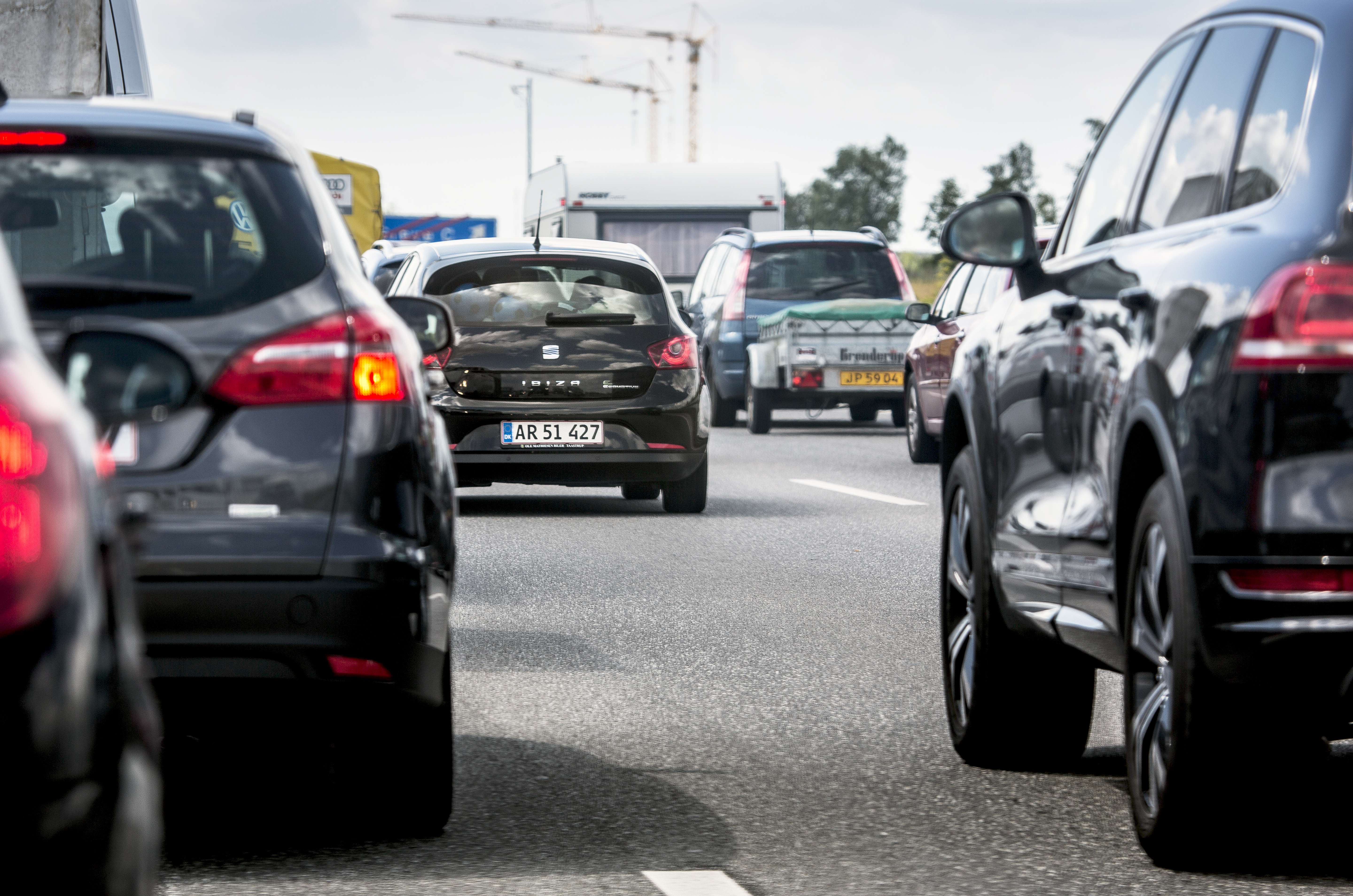 Motorvägen från Köpenhamn mot Köge, trafikbild Photo: News Øresund - Johan Wessman © News Øresund(CC BY 3.0) Detta verk av News Øresund är licensierat under en Creative Commons Erkännande 3.0 Unported-licens (CC BY 3.0). Bilden får fritt publiceras under förutsättning att källa anges. The picture can be used freely under the prerequisite that the source is given. News Øresund, Malmö, Sweden. Øresund är en oberoende regional nyhetsbyrå som är en del av det oberoende dansk-svenska kunskapscentrat Øresundsinstituttet.